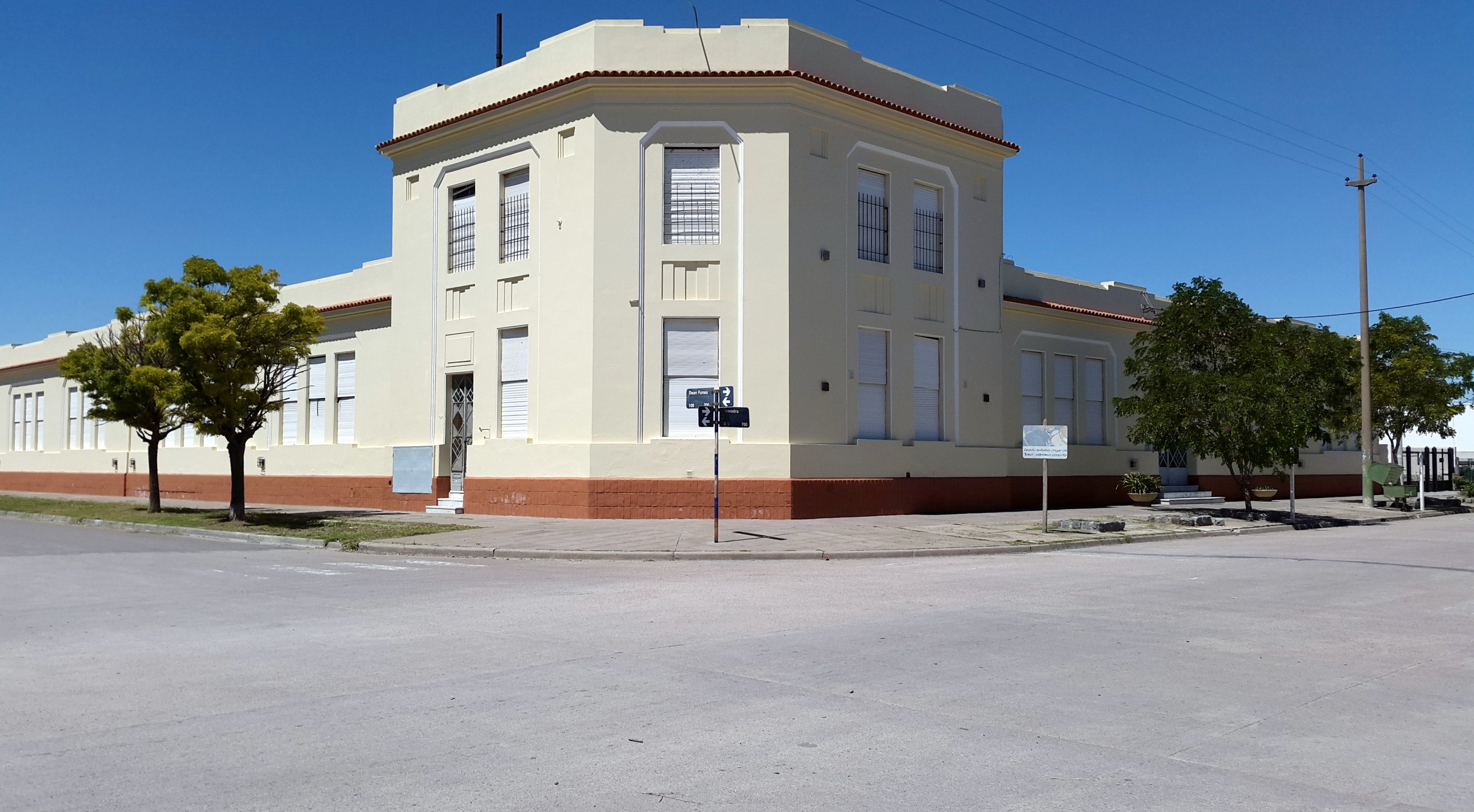 Vista del edificio de la escuela N° 14 de la ciudad de Gral. Daniel Cerri (imagen tomada en enero de 2015)